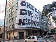 Faixa Polis